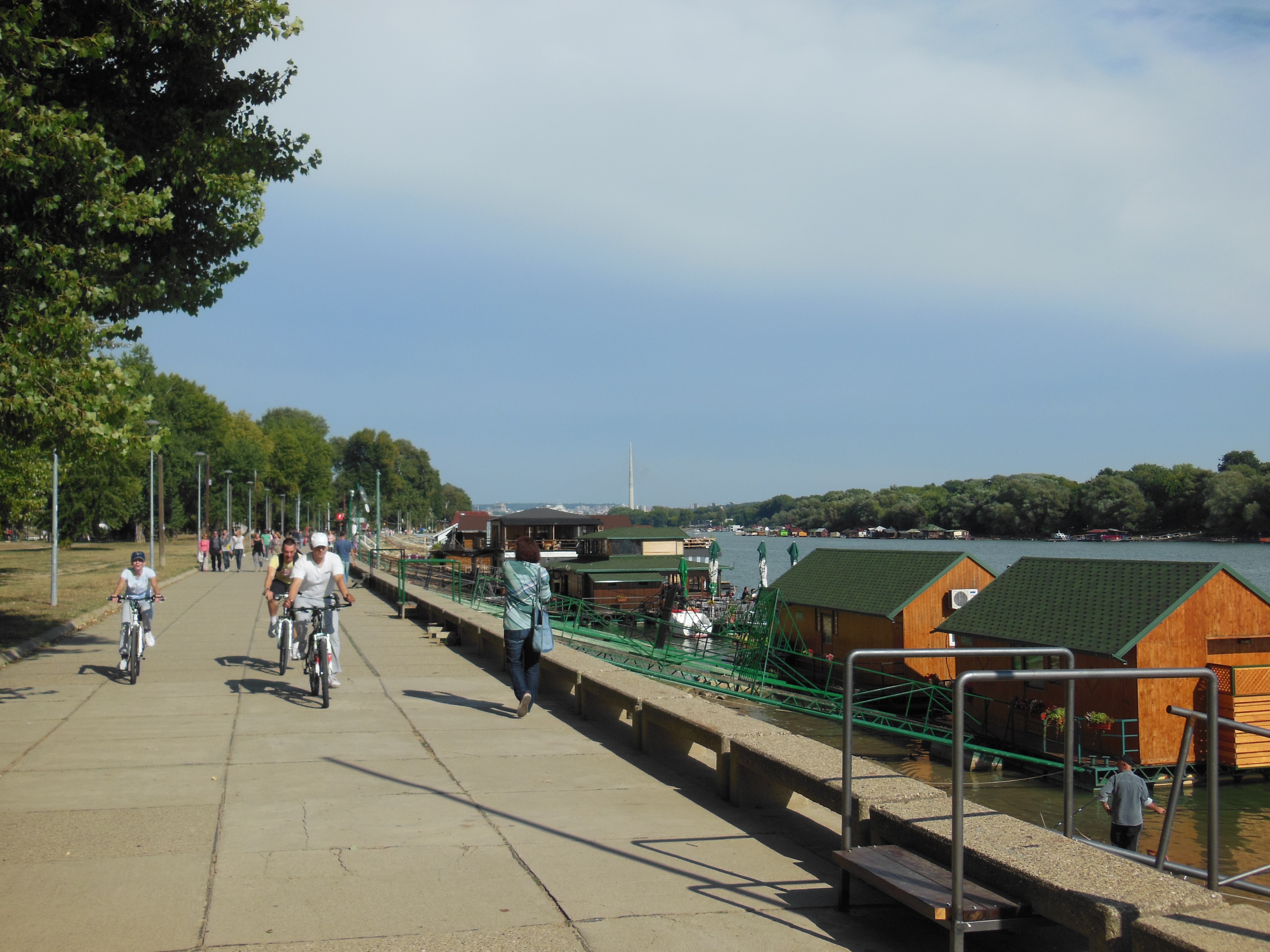 Savski kej, Beograd, 2013/09/15